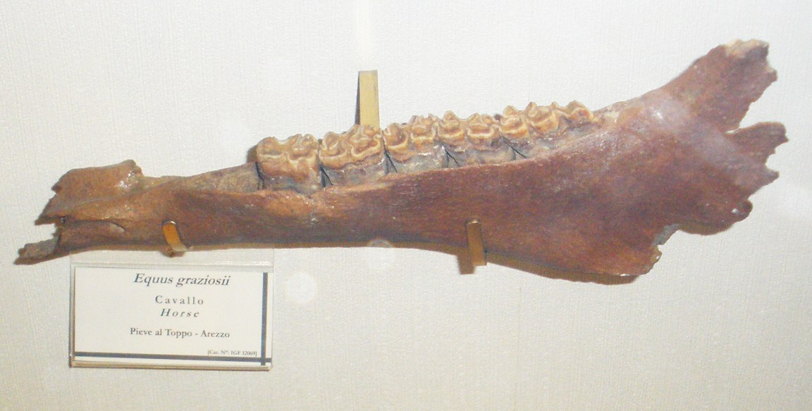 Fossil of Equus, an extinct mammal - Took the picture at Museo di Paleontologia di Firenze